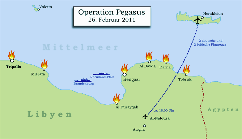 Karte der Operation Pegasus der Luftwaffe und Royal Air Force in Libyen am 26. Februar 2011.